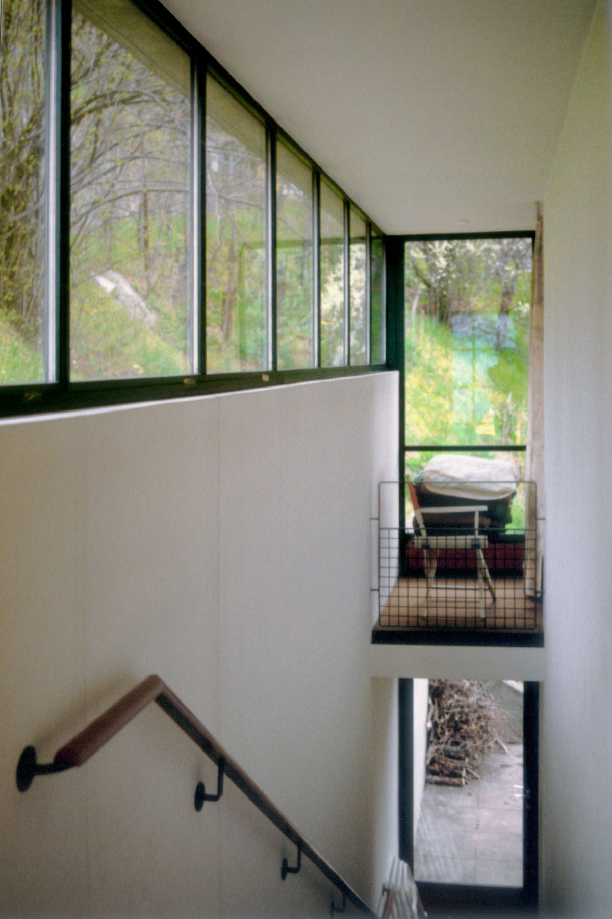 Brione sopra Minusio, Casa Kalmann (arch. Luigi Snozzi 1974-1976)